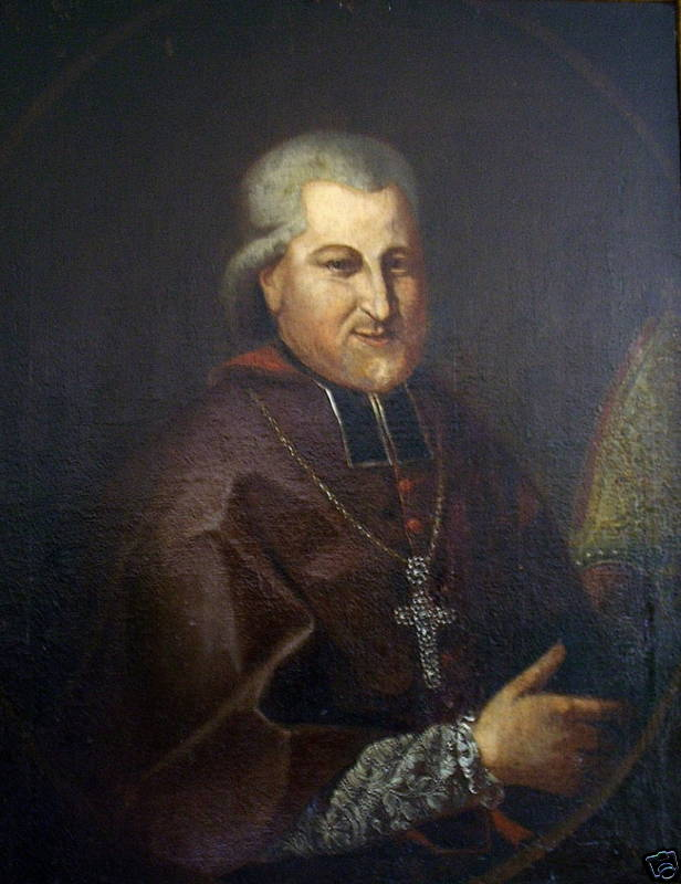 Brustportrait des Fürstpropstes und Fürstbischofs Joseph Conrad von Schroffenberg (1743–1803), um 1790, Öl auf Leinwand